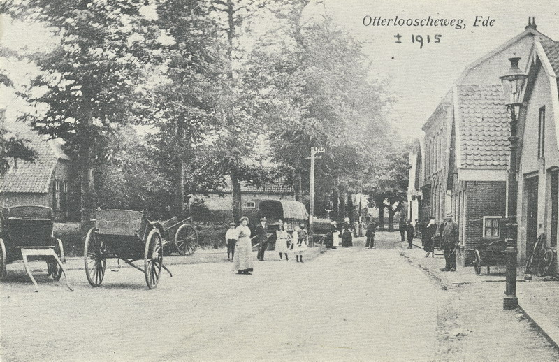 Dorpsgezicht Ede.